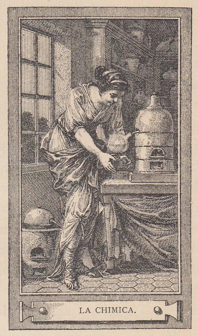 Allegoria - La Chimica - 1890 xilografia